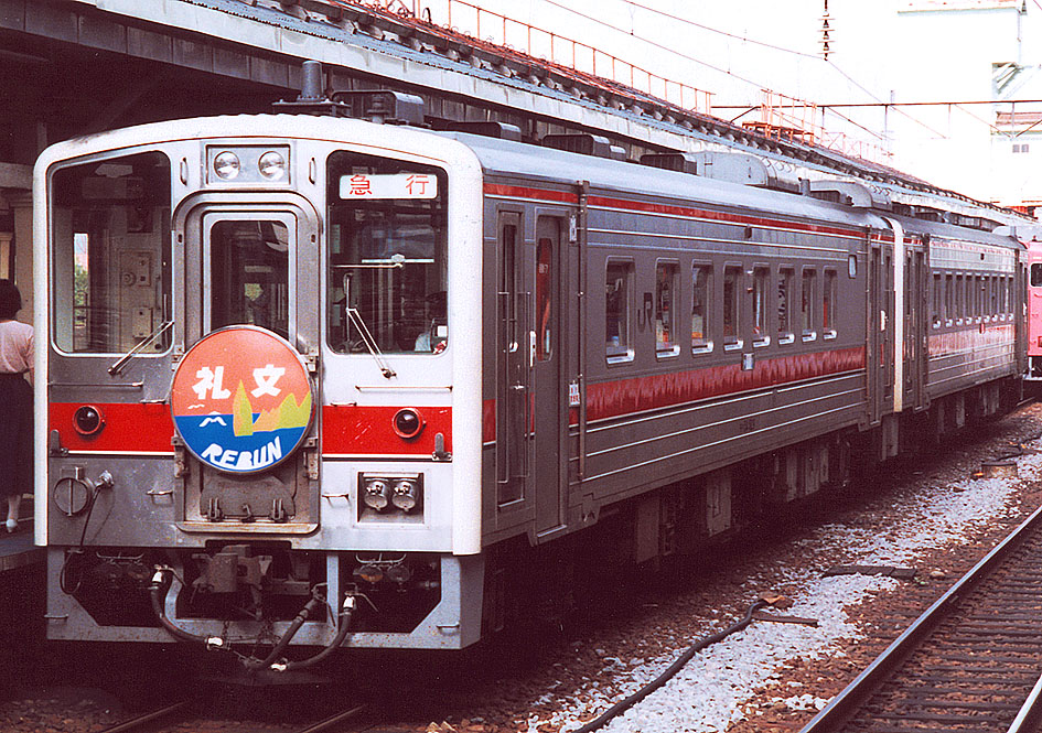 JR北海道 キハ54 500番台急行「礼文」